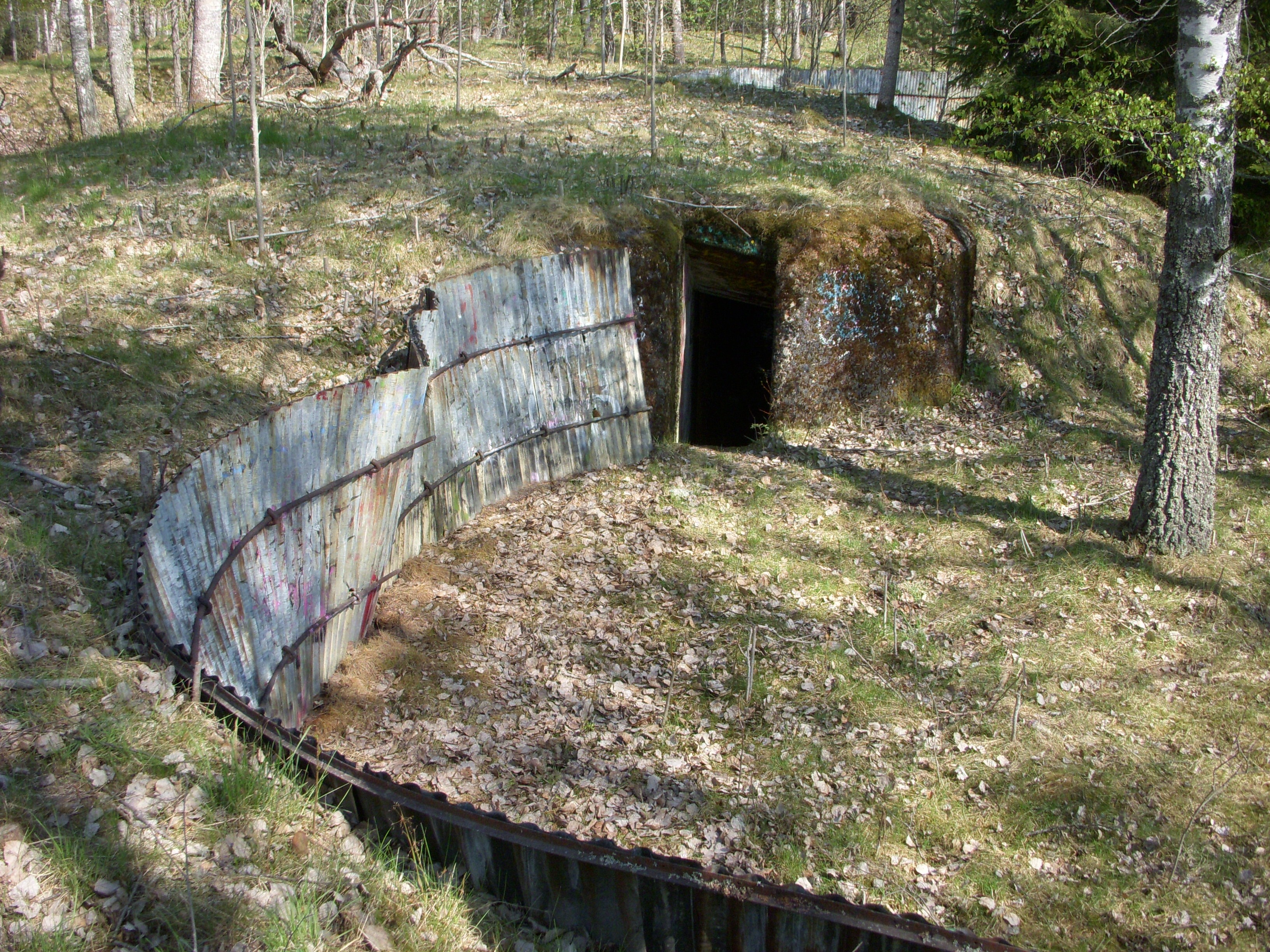 Artilleriställningen från första världskriget vid Karby gård, Täby